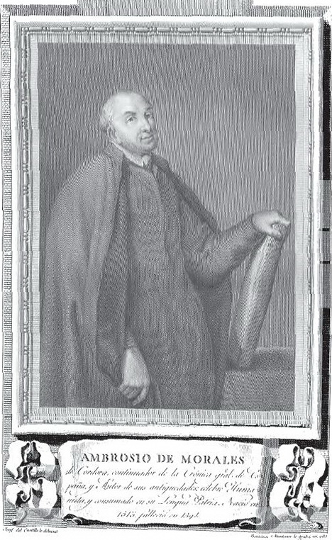 Retrato del historiador, humanista y arqueólogo cordobés Ambrosio de Morales (1513-1591).